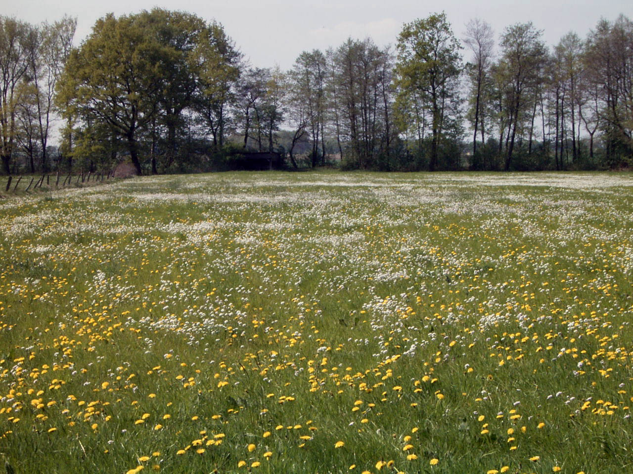 Zweischürige, das heißt zweimal im Jahr gemähte, nährstoffreiche Feuchtwiese mit Blühaspekt von Wiesenschaumkraut (Cardamine pratensis), Nordwestdeutschland (Wümmeniederung)